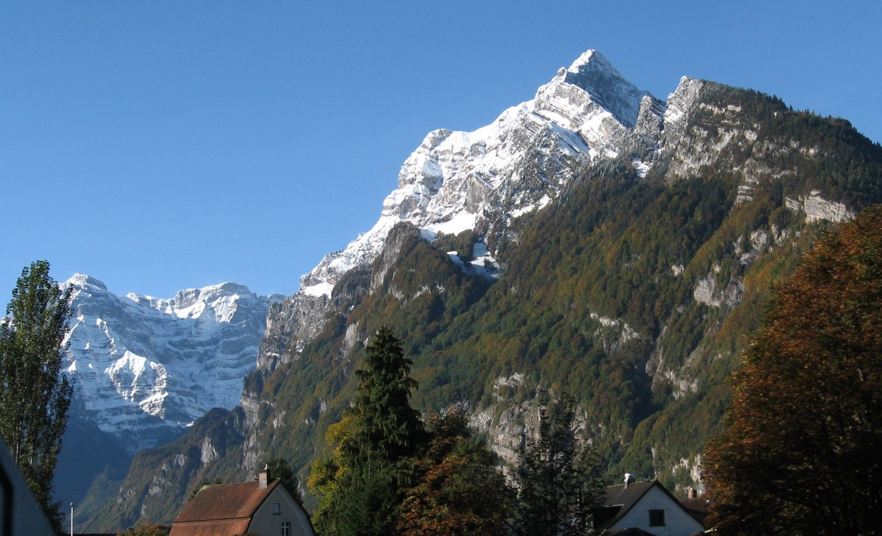 Der Rautispitz von Näfels gesehen, links die Höchnase und links im Hintergrund Glärnisch